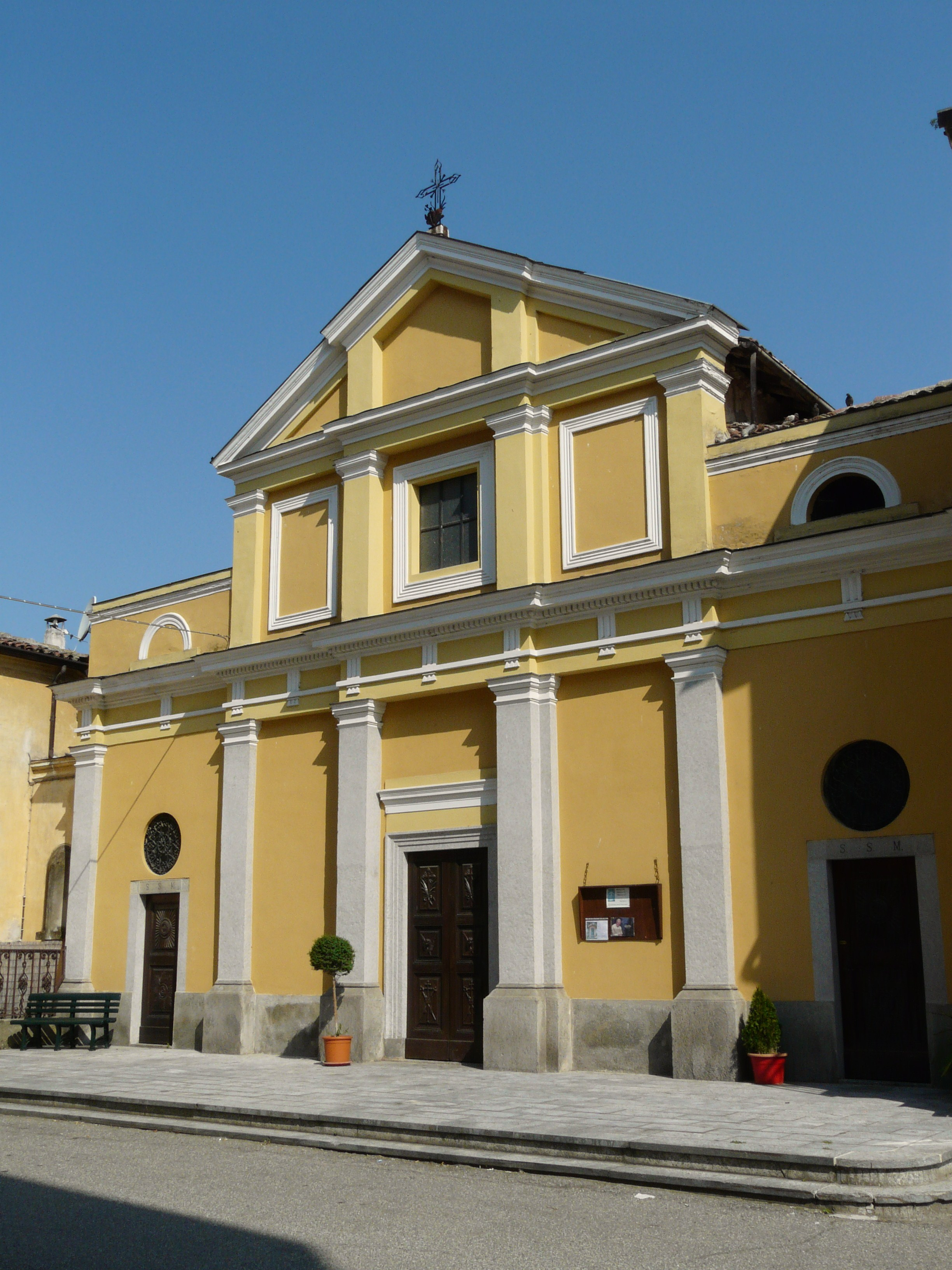 Chiesa di Via Giovanni Lanza, Mirabello Monferrato, Piemonte, Italia